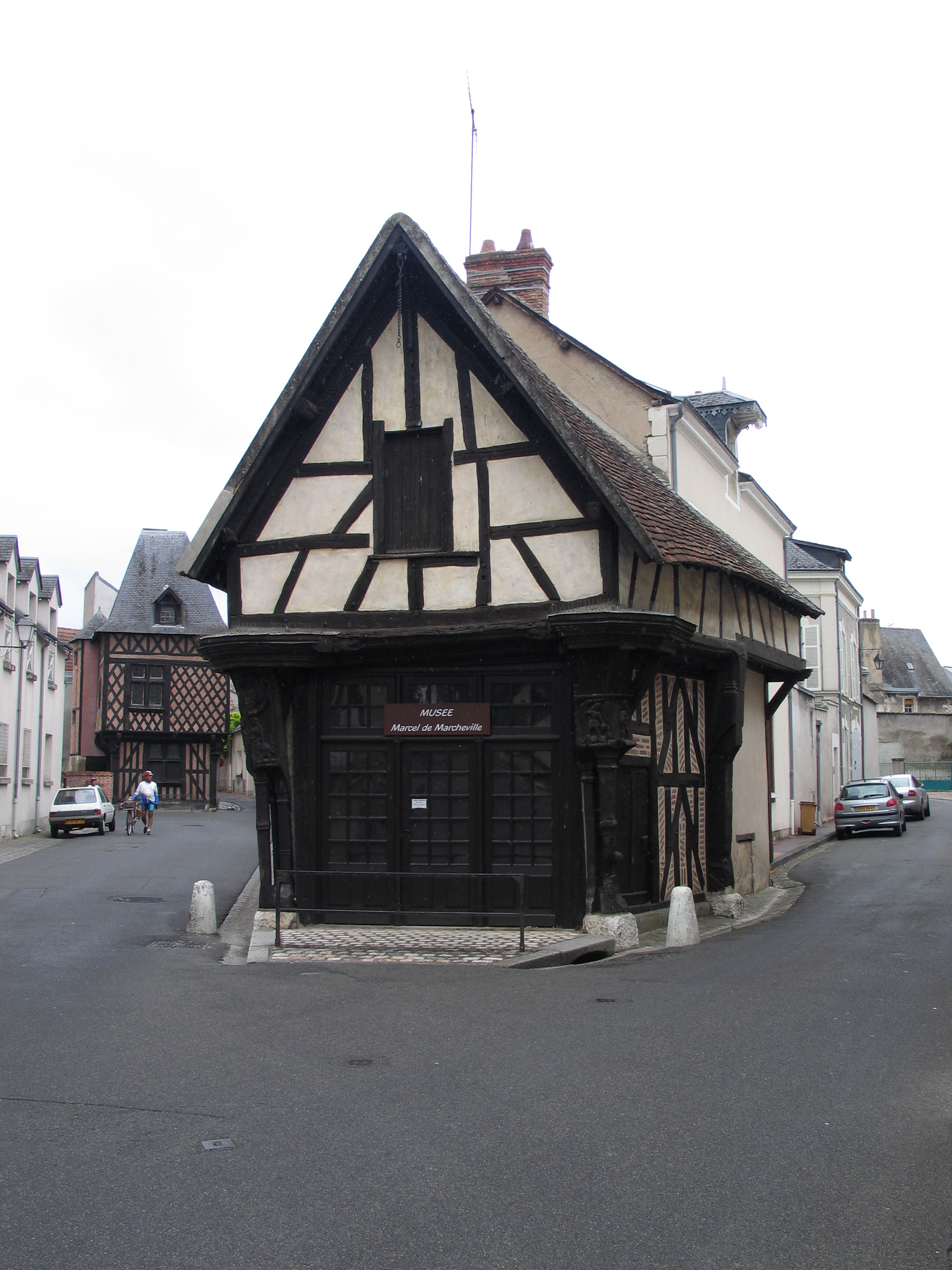 Le Carroir Doré, à Romorantin-Lanthenay, Loir-et-Cher, France